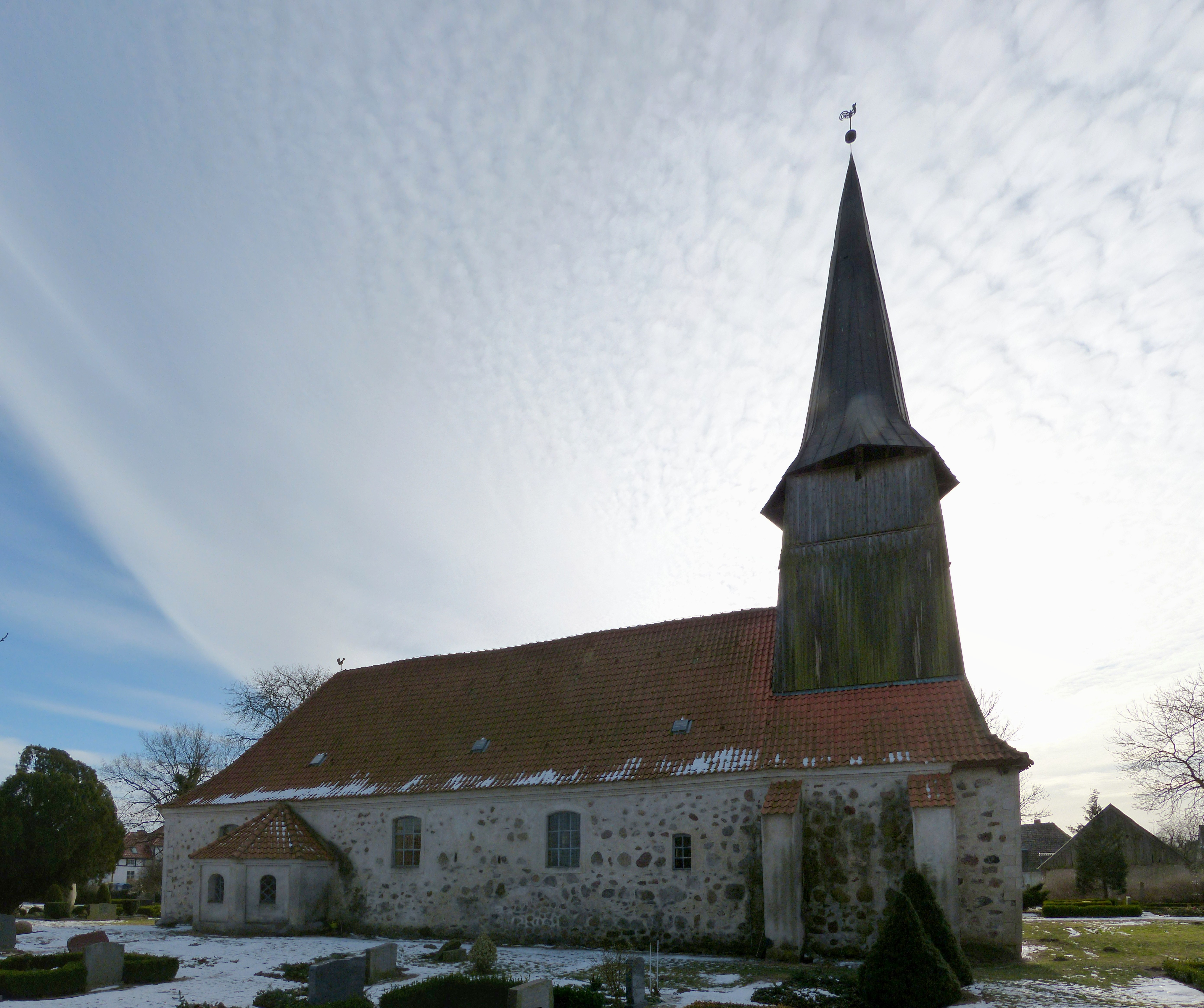 Kirche in Iven, Nordseite